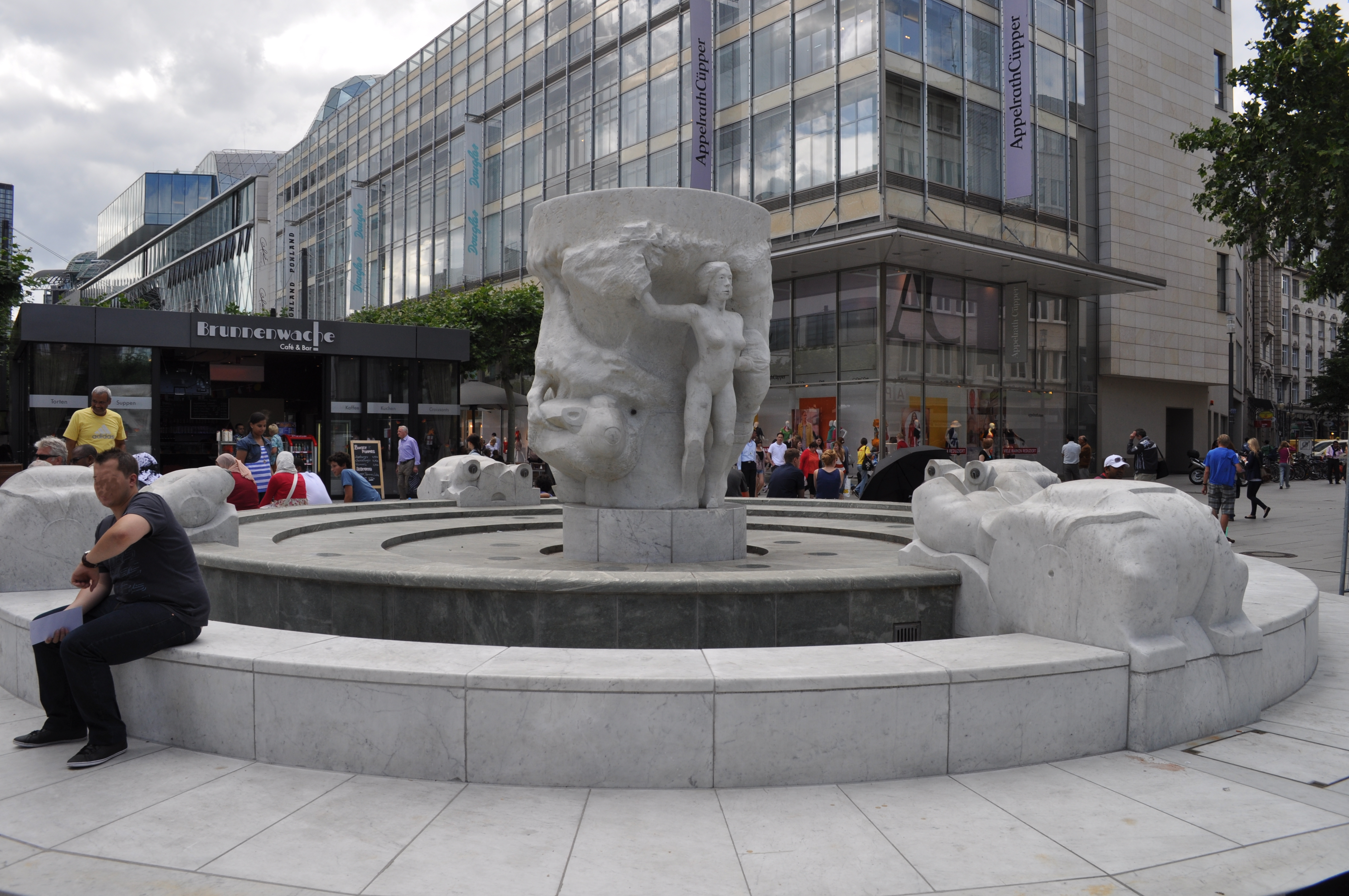 Frankfurt, Brockhausbrunnen auf der Zeil. Blick auf die Neubebauung des Eckgrundstücks Zeil Stiftsstraße durch die Douglas Holding auf der Parzelle des niedergelegten Kaufhaus M. Schneider.